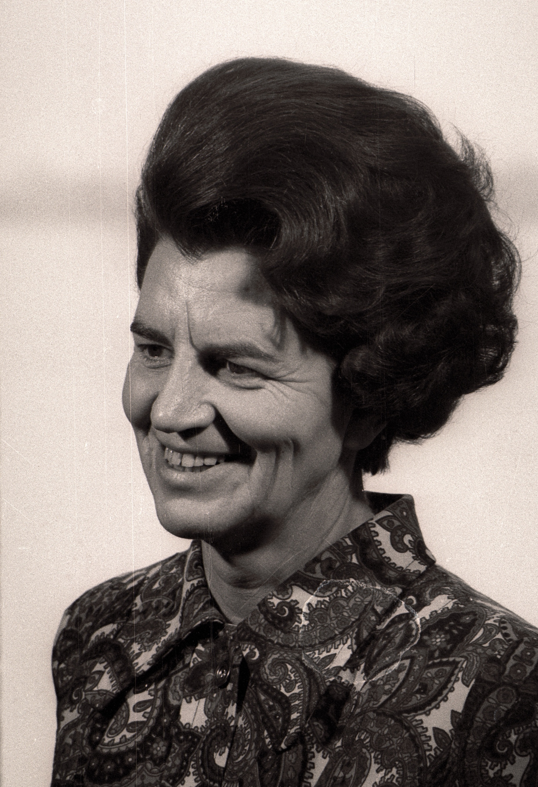 Porträt Liselotte Funcke